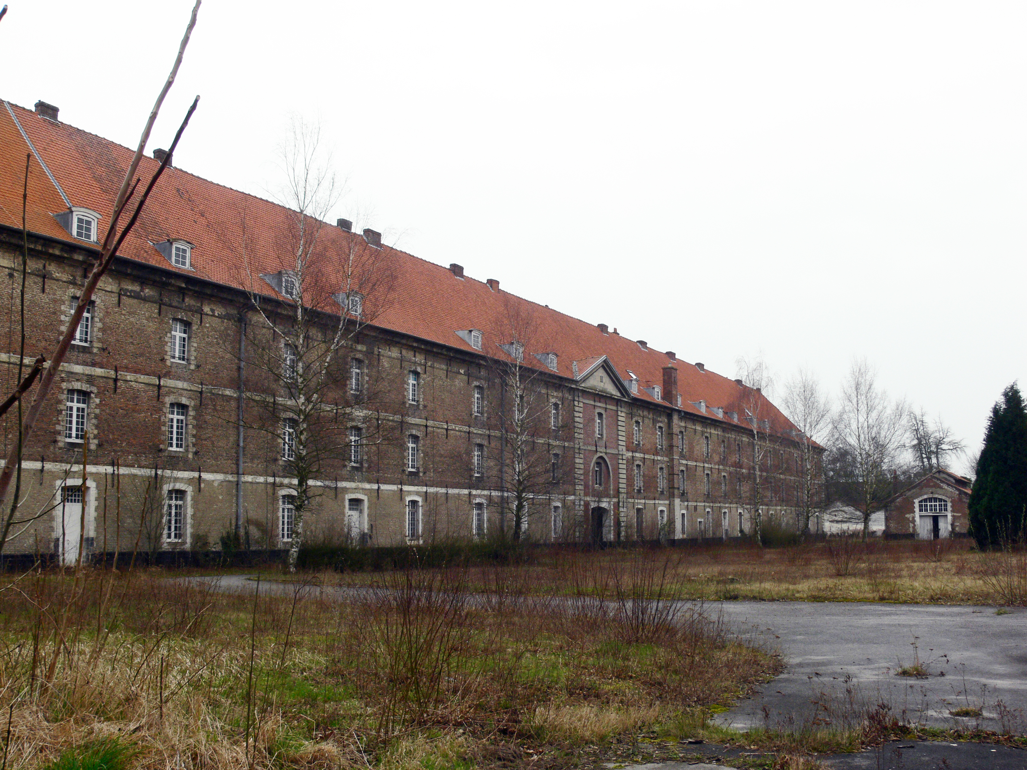 Douai - Caserne Corbineau